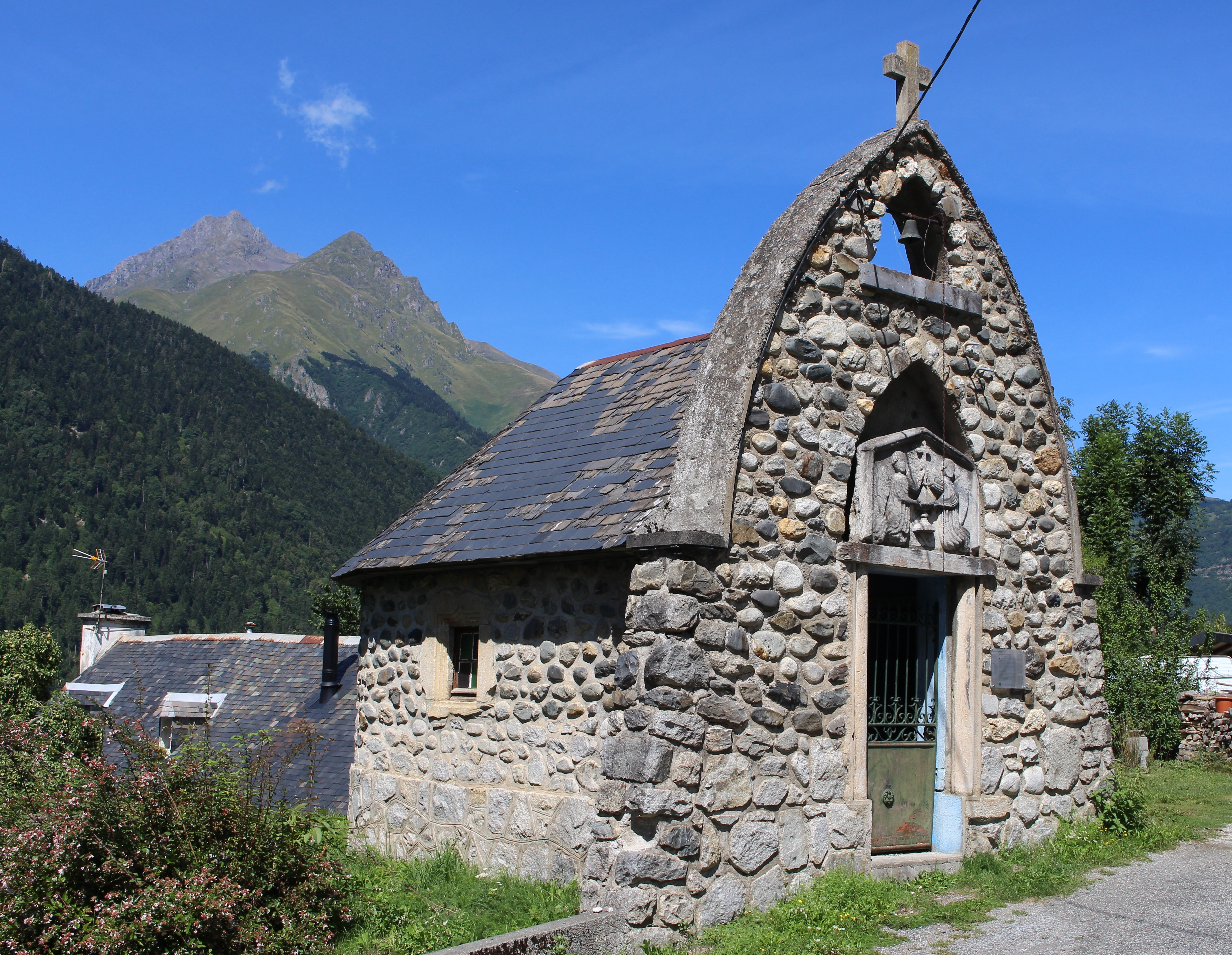 Chapelle Notre-Dame de-la-Délivrance de Guchan (Hautes-Pyrénées)